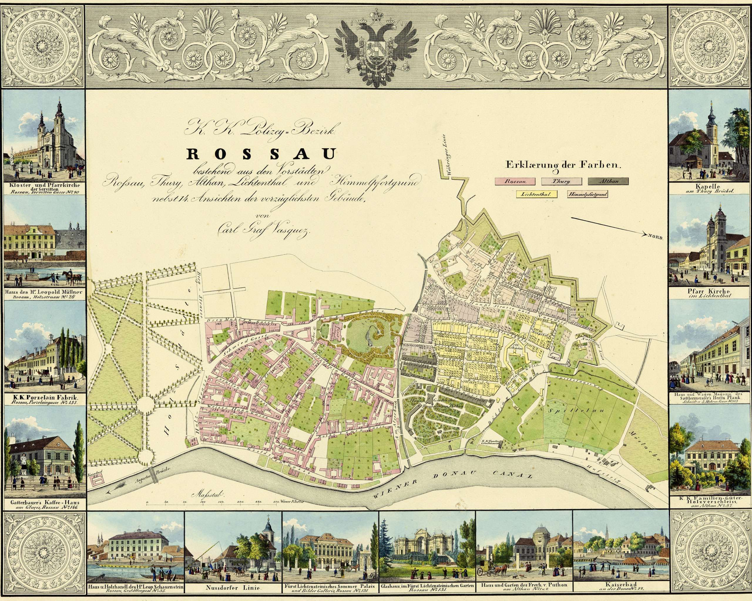 K. K. Polizey-Bezirk Rossau, bestehend aus den Vorstädten Rossau, Thury, Althan, Lichtenthal, und Himmelpfortgrund, nebst Ansichten der vorzüglichsten Gebäudeheute: Bezirksteile des Wiener Gemeindebezirks Alsergrund